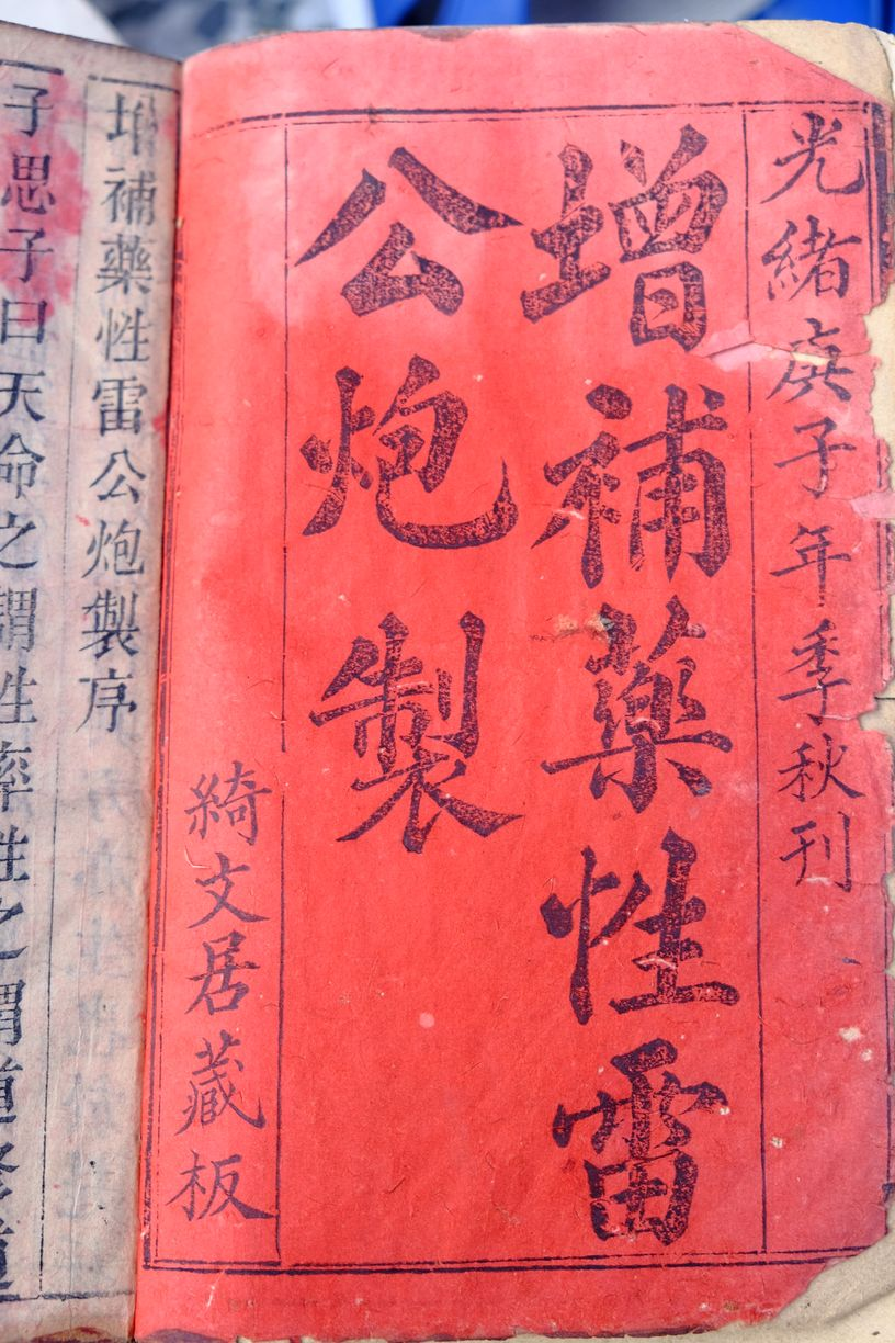 中文（台灣）: 增補藥性雷公泡製